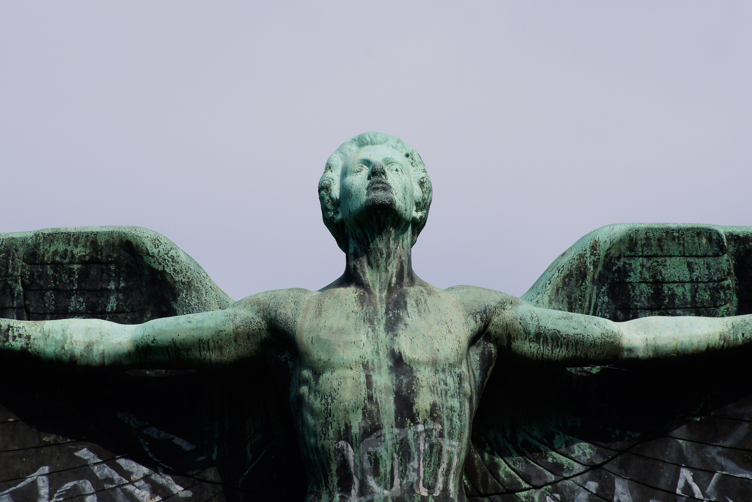 Otto-Lilienthal-Denkmal von Peter Breuer (1914), Veränderungen mit Bronzerelief von Magdalena Müller-Martin (1956), Bäkestraße 14a; in der Denkmalliste zur Nr. 09097301 eingetragen.